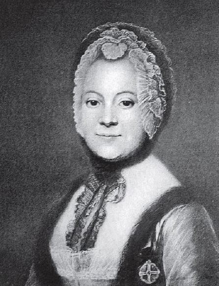 Portret Anny Elżbiety z Potockich (Franciszkowej) Potockiej (1724-1772)